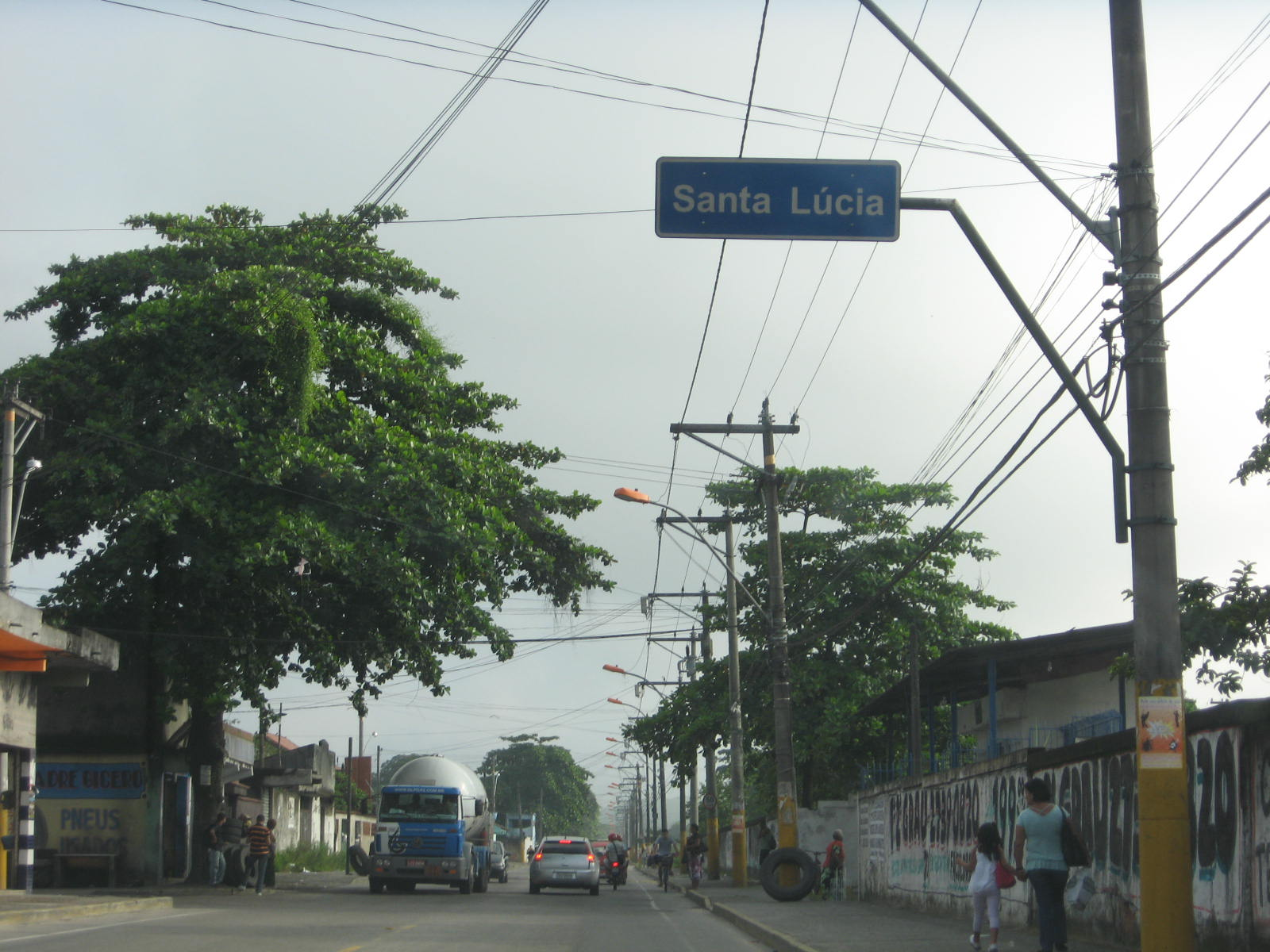 Vista do bairro de Santa Lúcia, em Duque de Caxias.